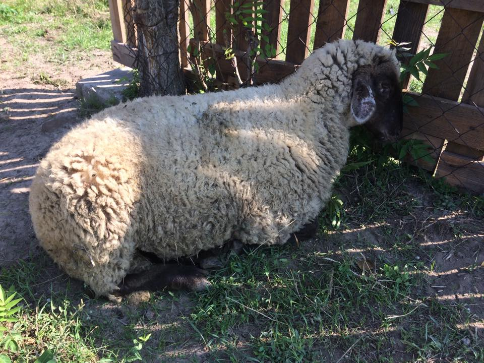 Cigája (Tápiószele)